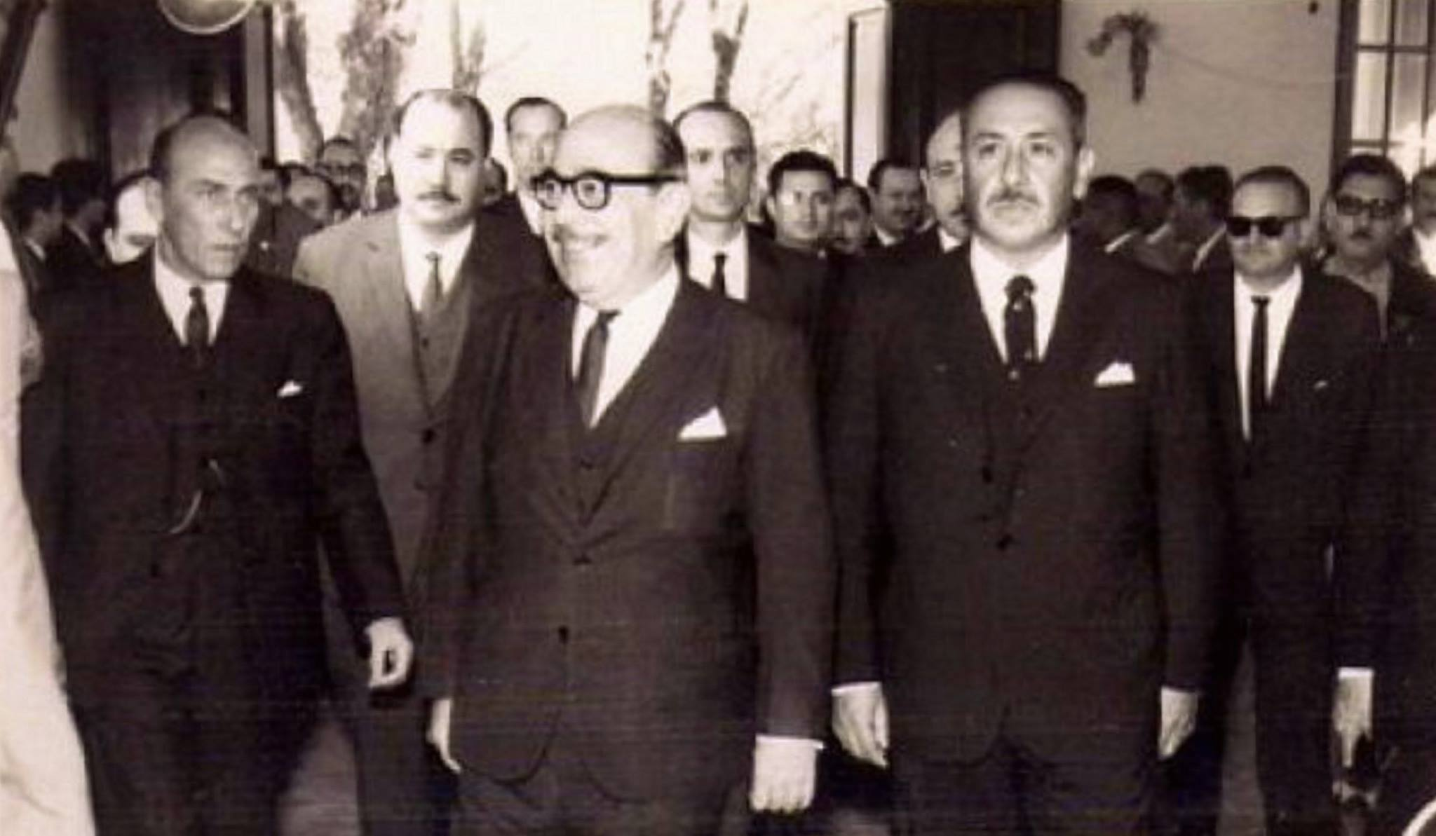 Diego Nicolás Díaz Colodrero - Gobernador de Corrientes (1963-66)